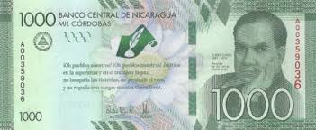 es un billete de 1000 cordobas